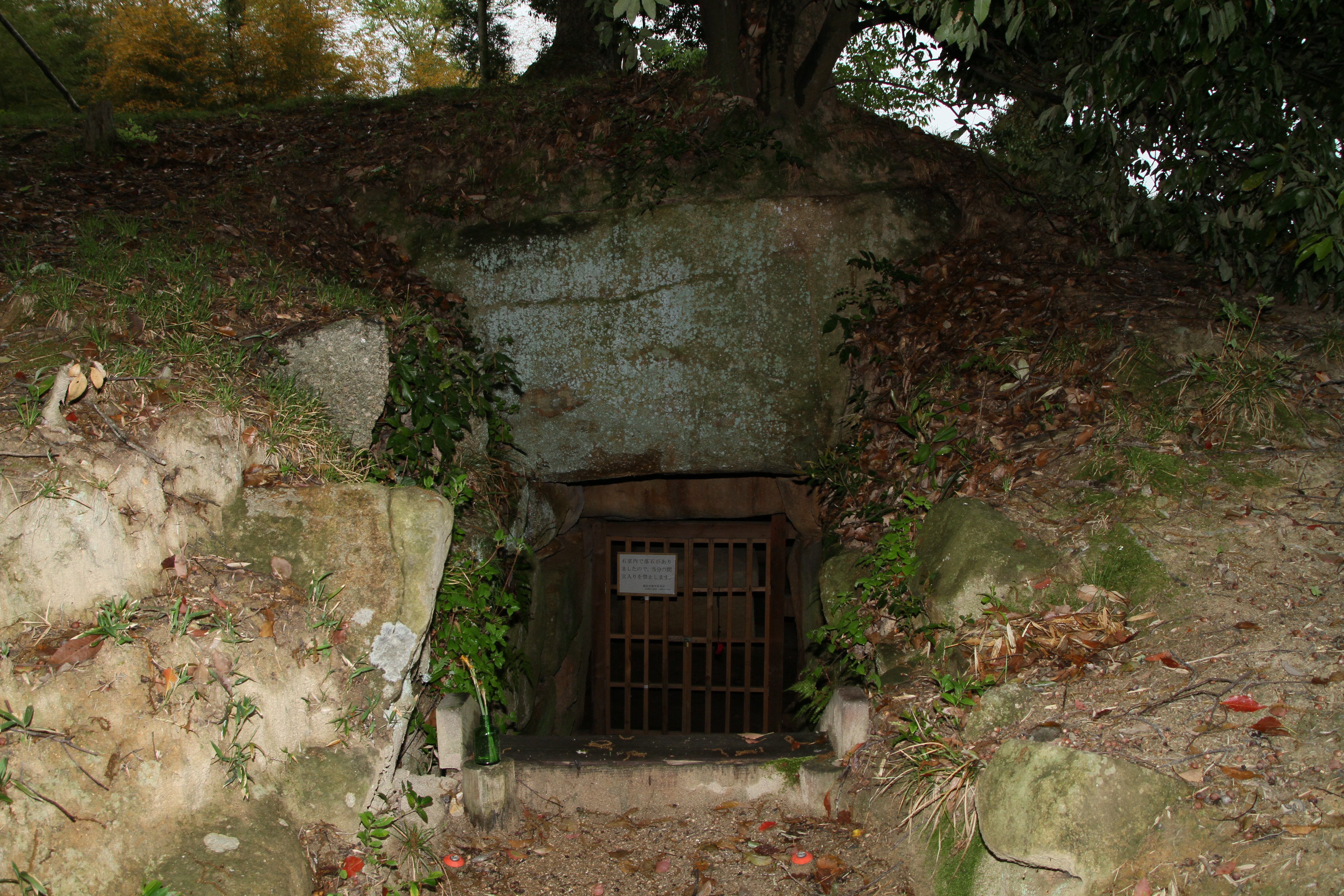 江崎古墳 横穴式石室の開口部